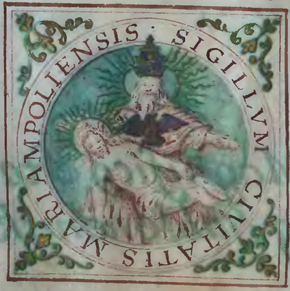 SIGILLVM CIVITATIS MARIAMPOLIENSIS